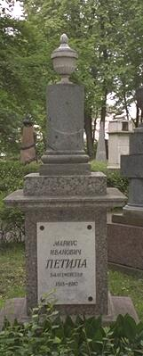 Photo taken by myself of the grave of Marius Petipa. Mrlopez2681 09:38, 11 August 2006 (UTC) De afbeelding is afkomstig van de eng. Wikipedia de auteur Mrlopez2681 heeft de foto onder het publieke domein gezet op 11 augustus 2006. Image:Petipamarius.jpg